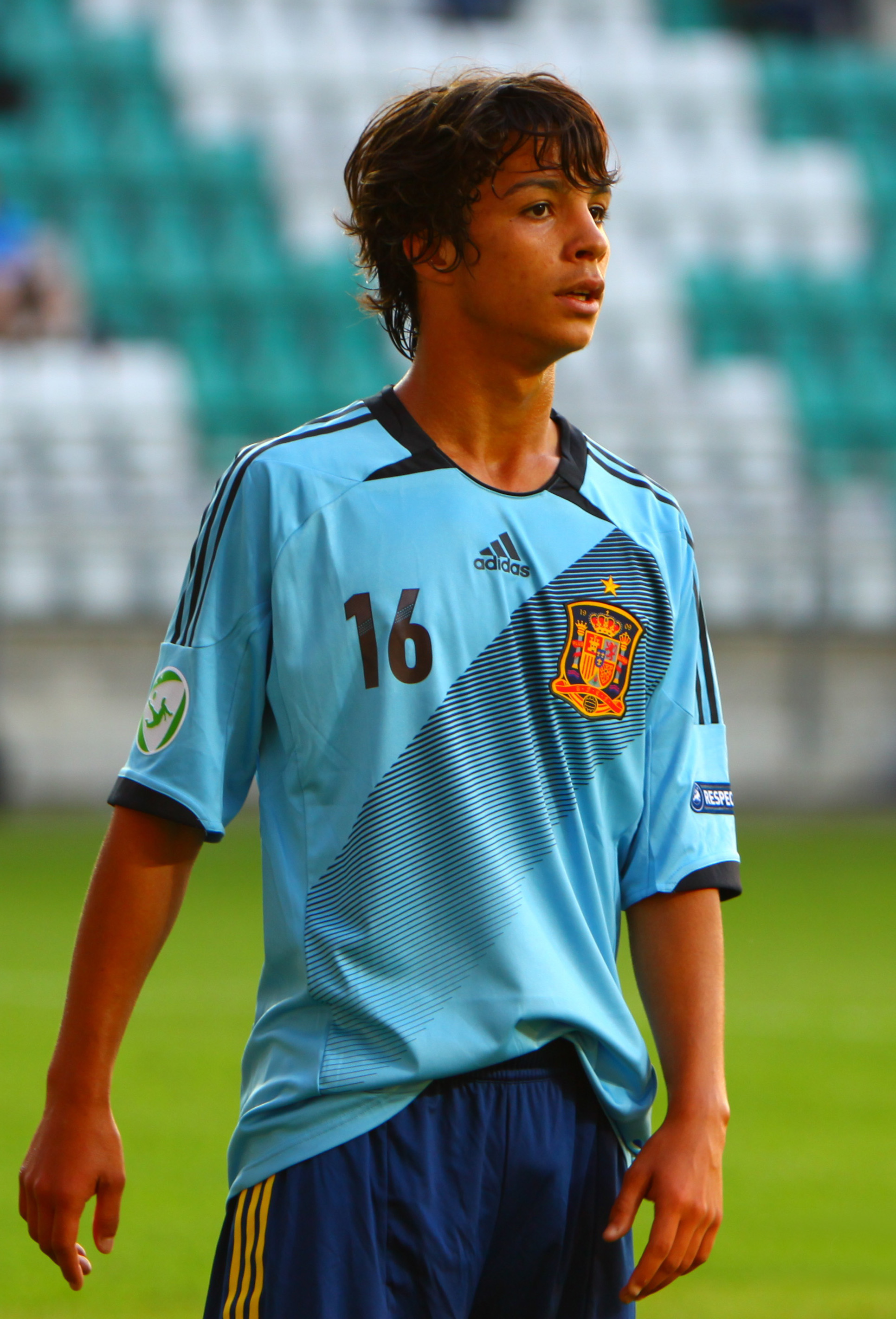 U-19 Portugal vs Spain.